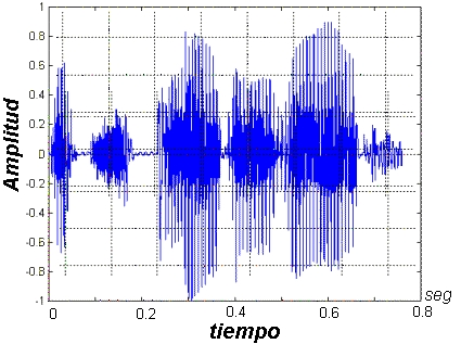 Aparato Fonador Humano